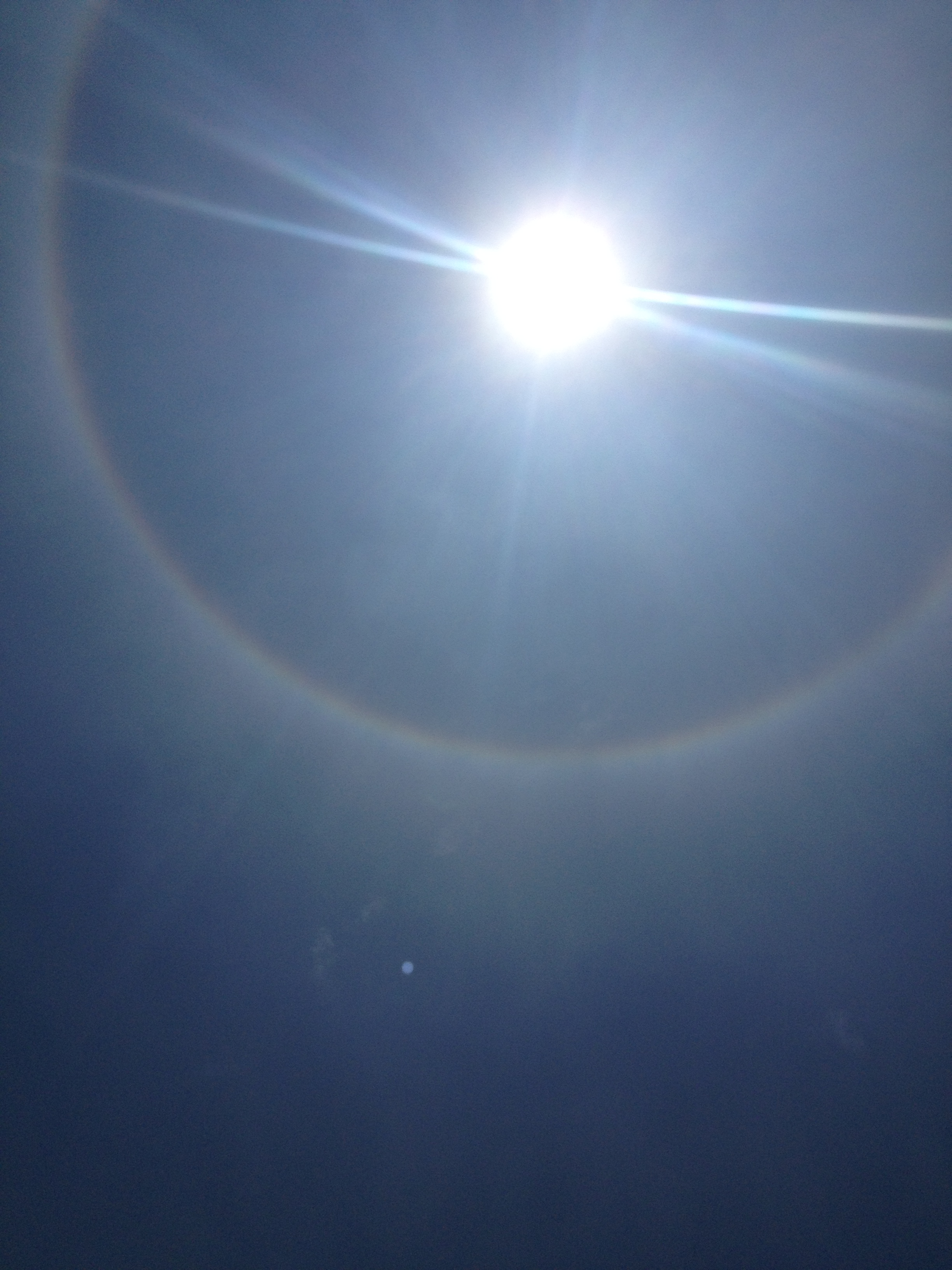 Halo visible desde la tierra, a las 12:00 de mediodía, junto a una estrella.